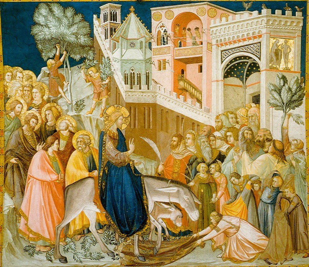 Assisi-frescoes-entry-into-jerusalem-pietro_lorenzetti. Assisi, Lower Basilica, San Francesco, southern transept